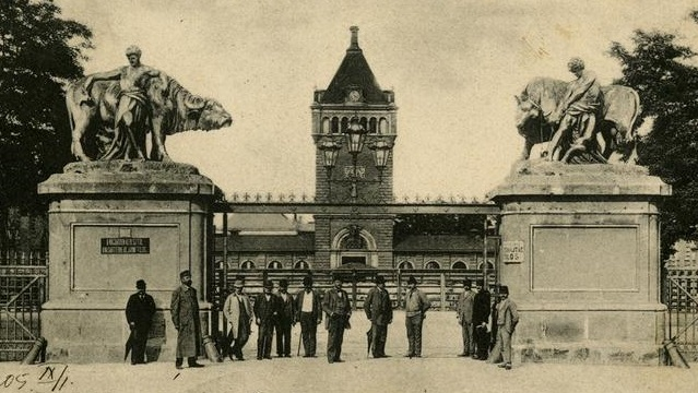 Közvágóhíd